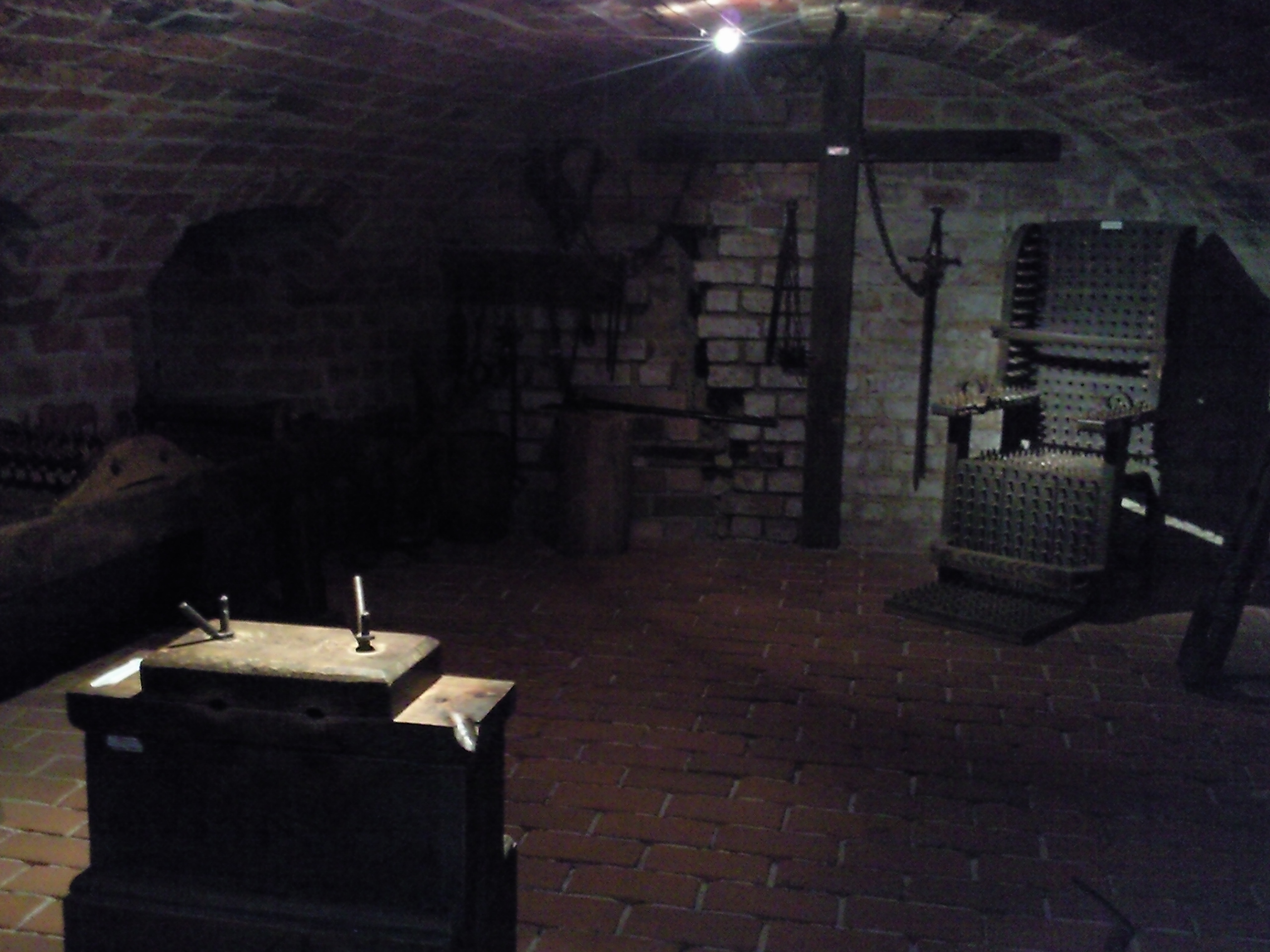 Folterkeller der Alten Burg in Penzlin. Hier wurde unter anderem, die als Hexe bezichtigte Benigna Schultzen gefoltert, damit sie ein Geständnis abgibt.